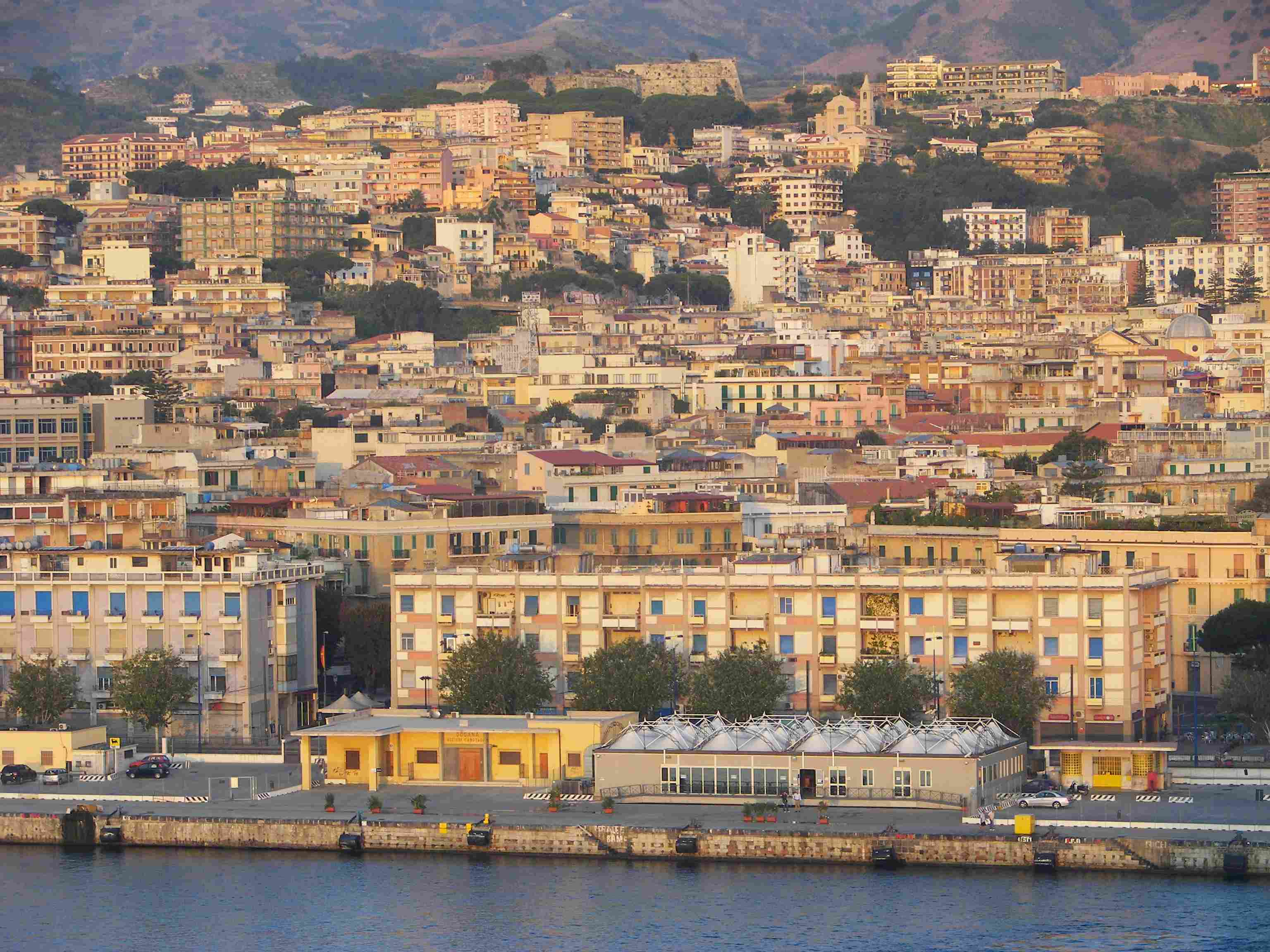 Messina von der Hafeneinfahrt aus gesehen